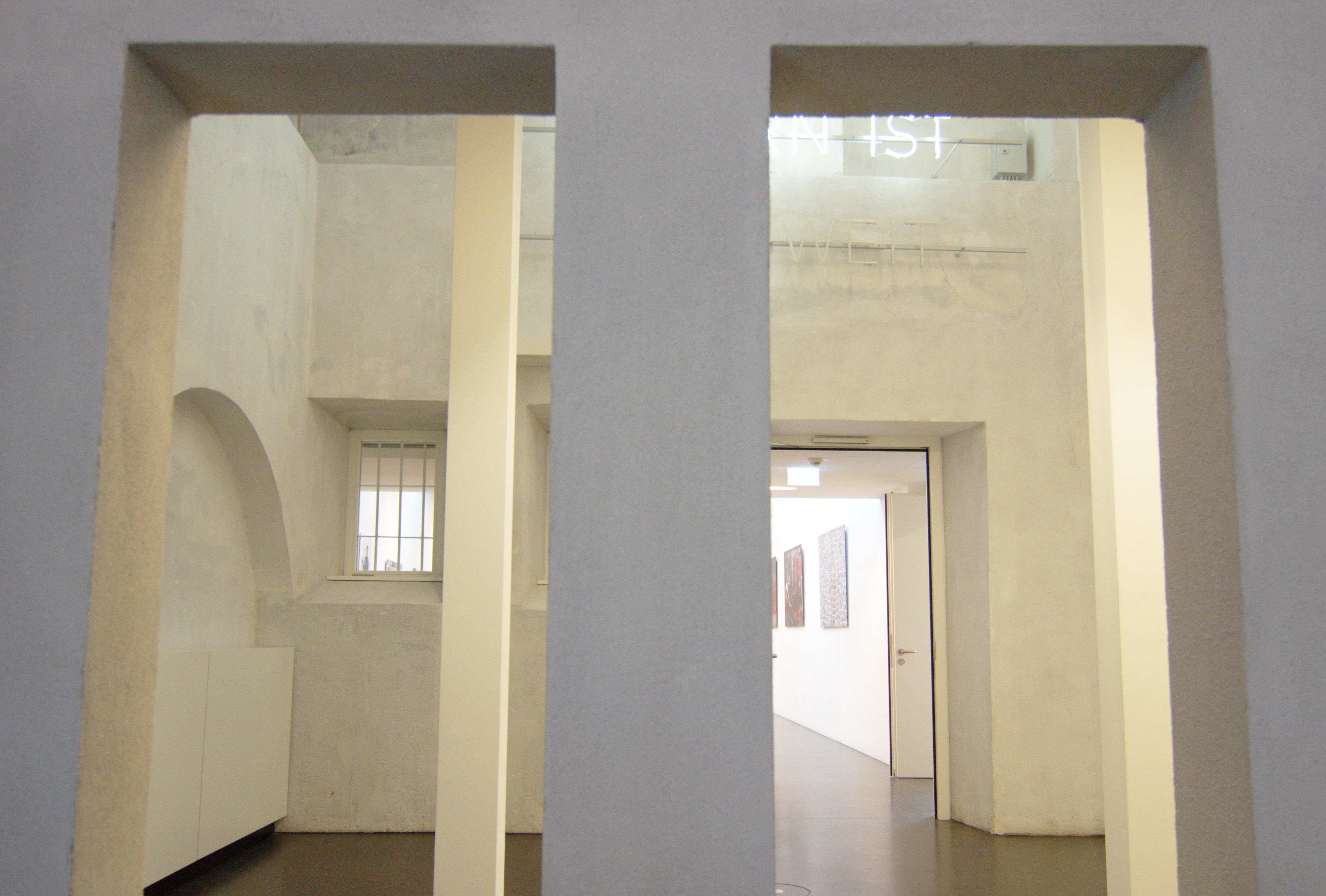 Innenarchitektur im MIK Museum Information Kunst in Ludwigsburg; Durchblick vom Café Zichorie zum Ausstellungsraum des Kunstvereins